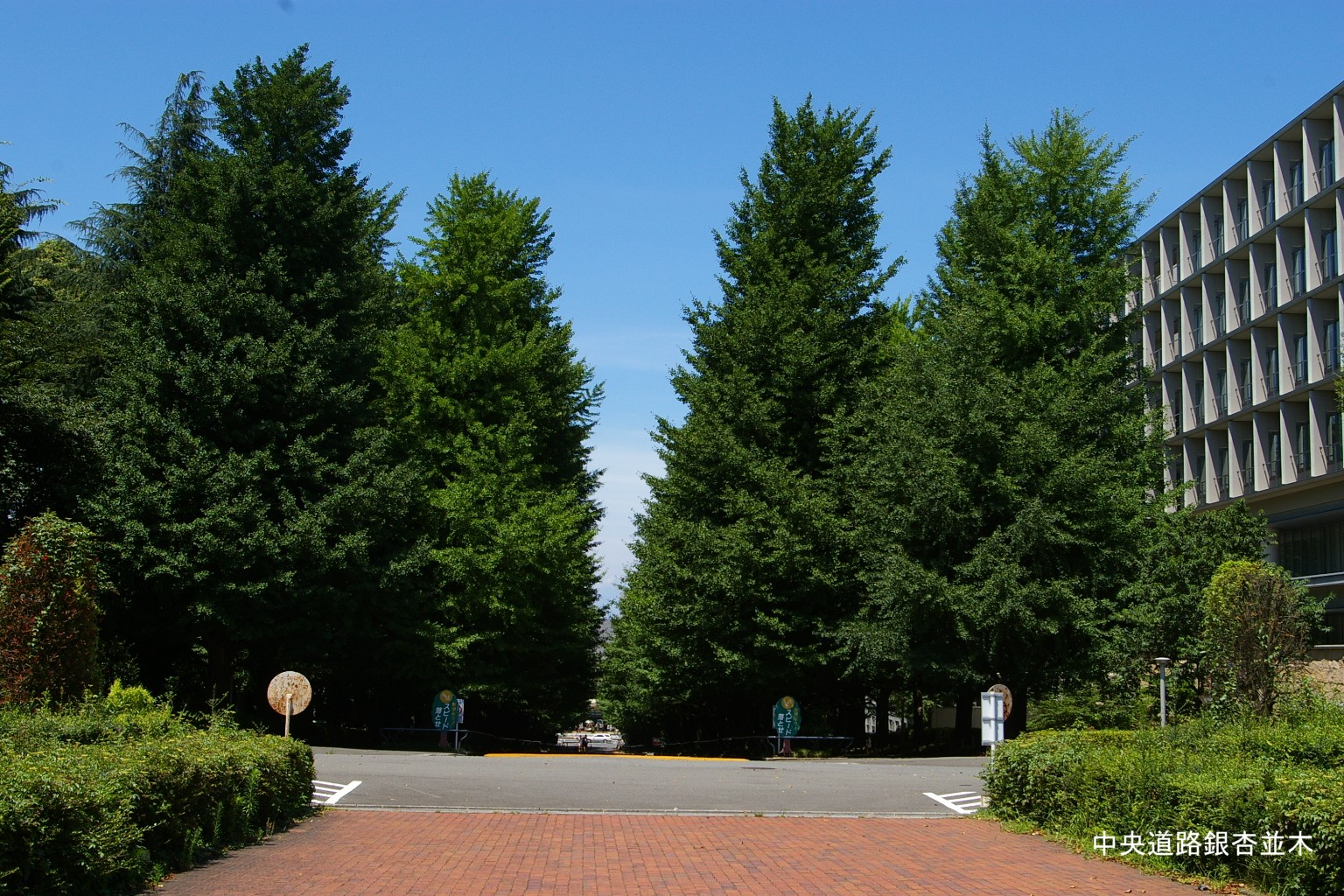 2009.5日本国内で塾生 (talk)が撮影。